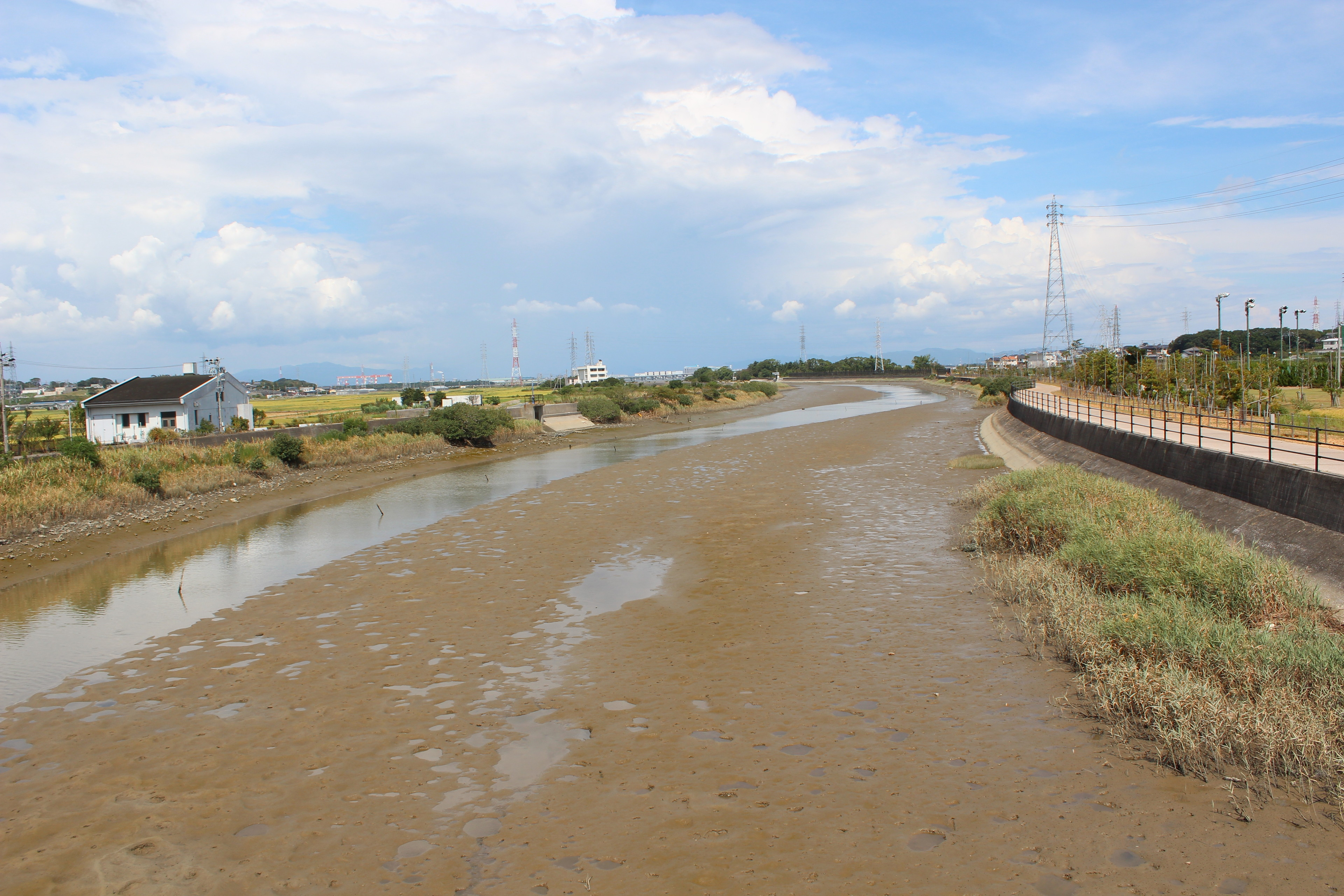 汐川干潟へ流れ込む汐川下流域と田原市中央公園（右端）